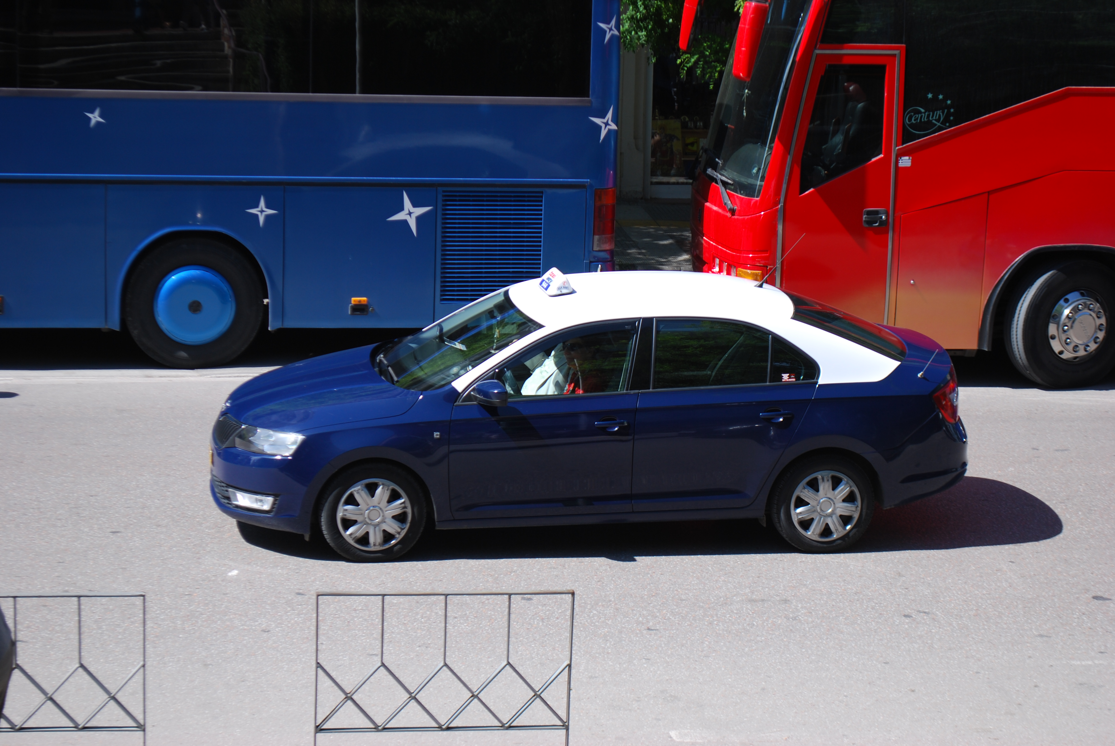 Vue de Thessalonique.